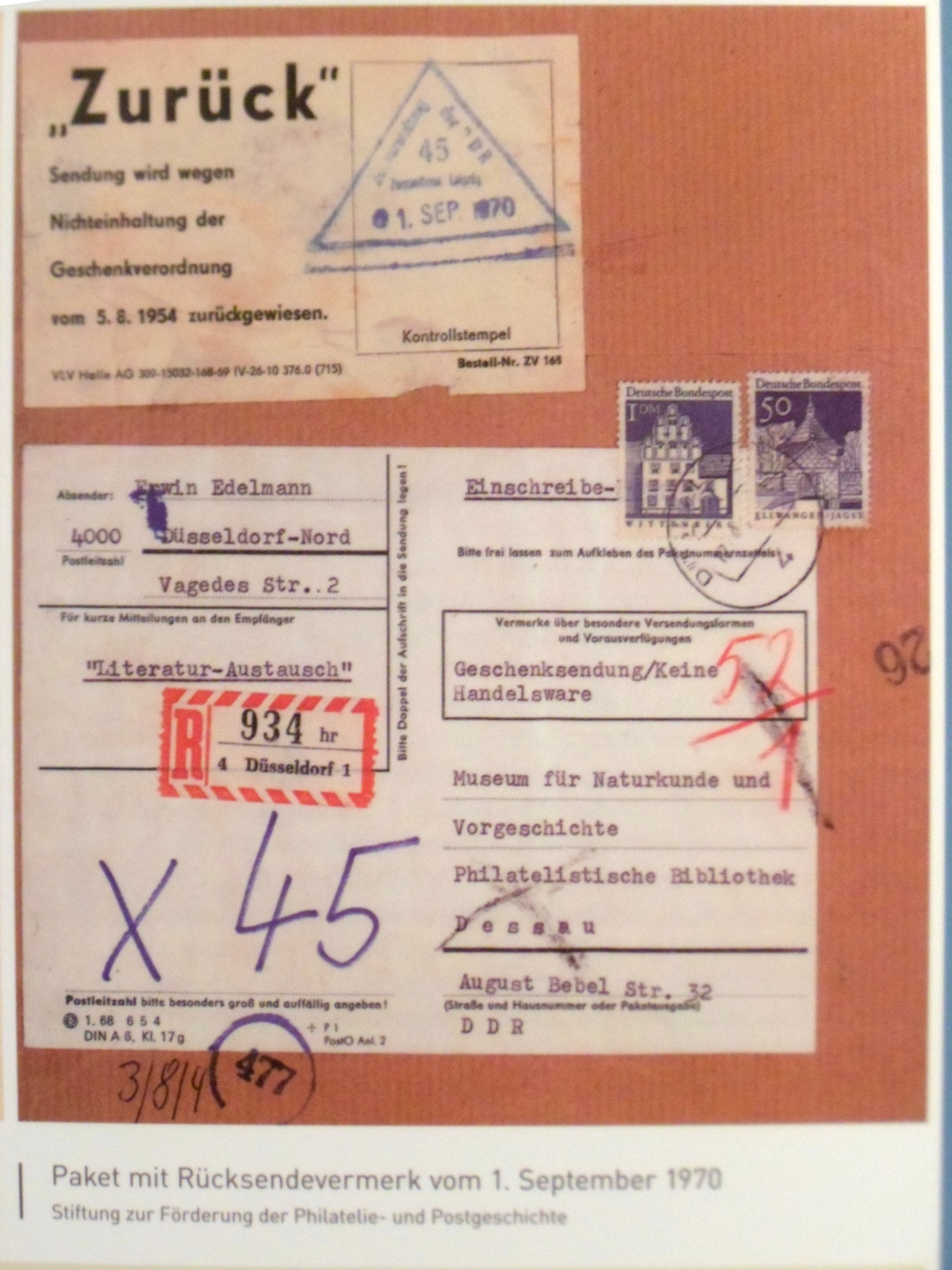 Hamburg, Speicherstadt, Deutsches Zollmuseum, Zolldokumente aus der DDR